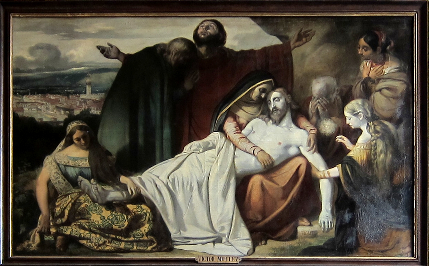 La déploration du Christ (ou Le Christ au tombeau)